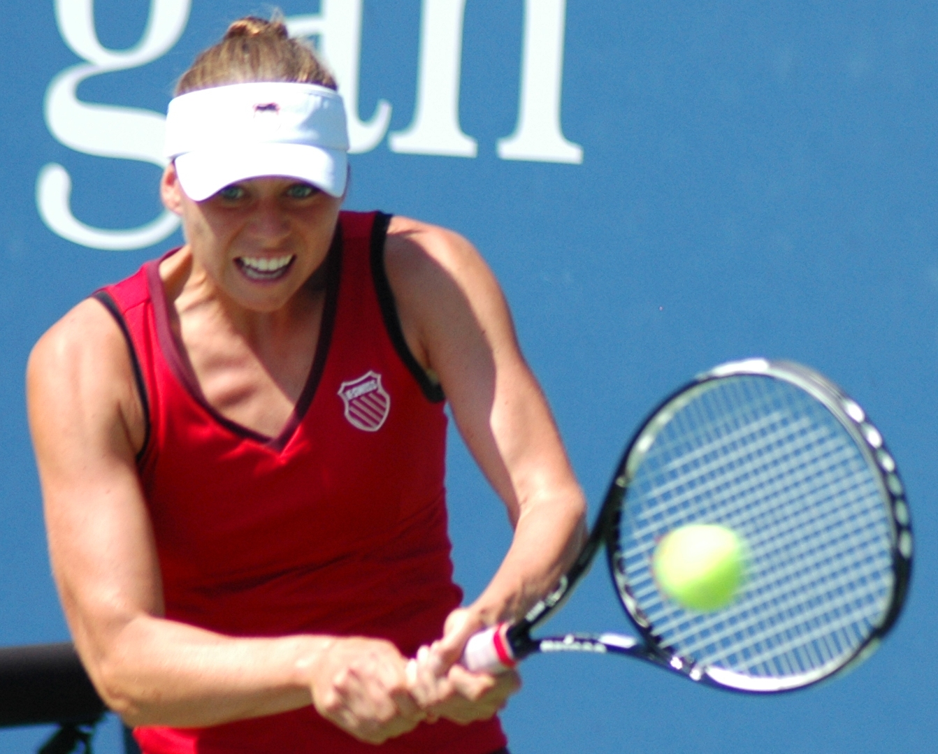 Vera Zvonareva US Open 2009